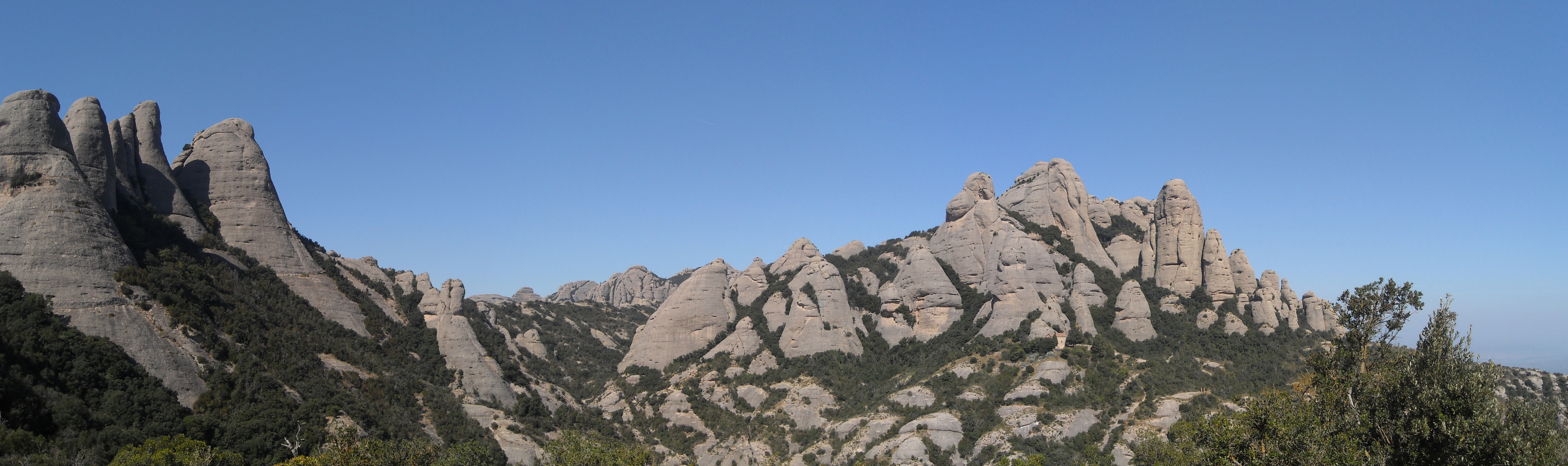 Agulles d'esquerra a dreta: Mariner, Magdalenes, Gorra Frígia, Trencabarrals, Bisbe, La Prenyada, Elefant i Mòmia, a Montserrat.